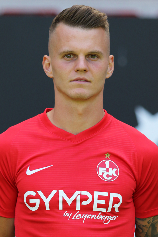 Florian Pick (Nr. 11)